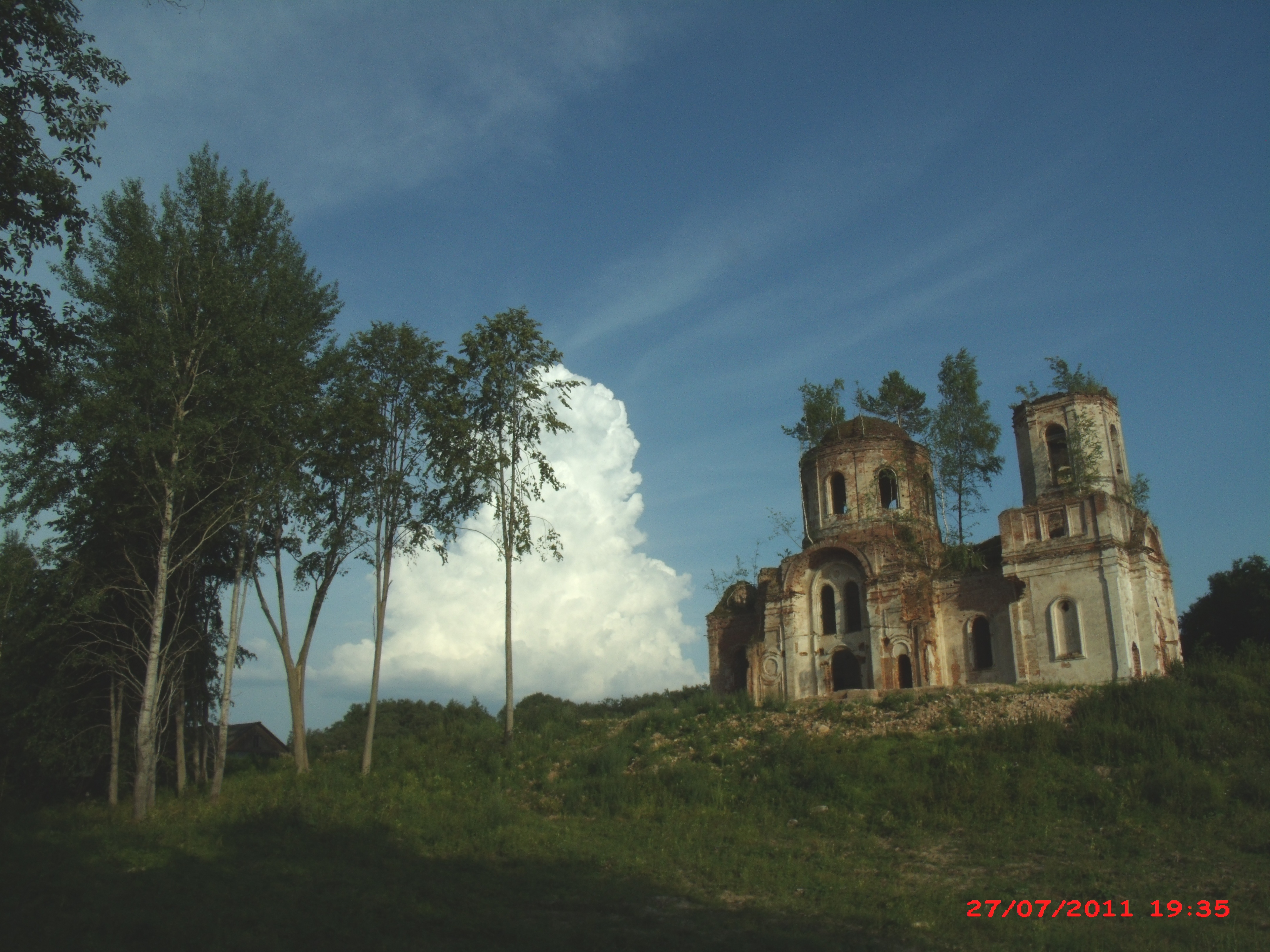 Троицкая церковь (Тверская область, Осташков, деревня Климова гора (погост троица на переволоке, село переволоки))